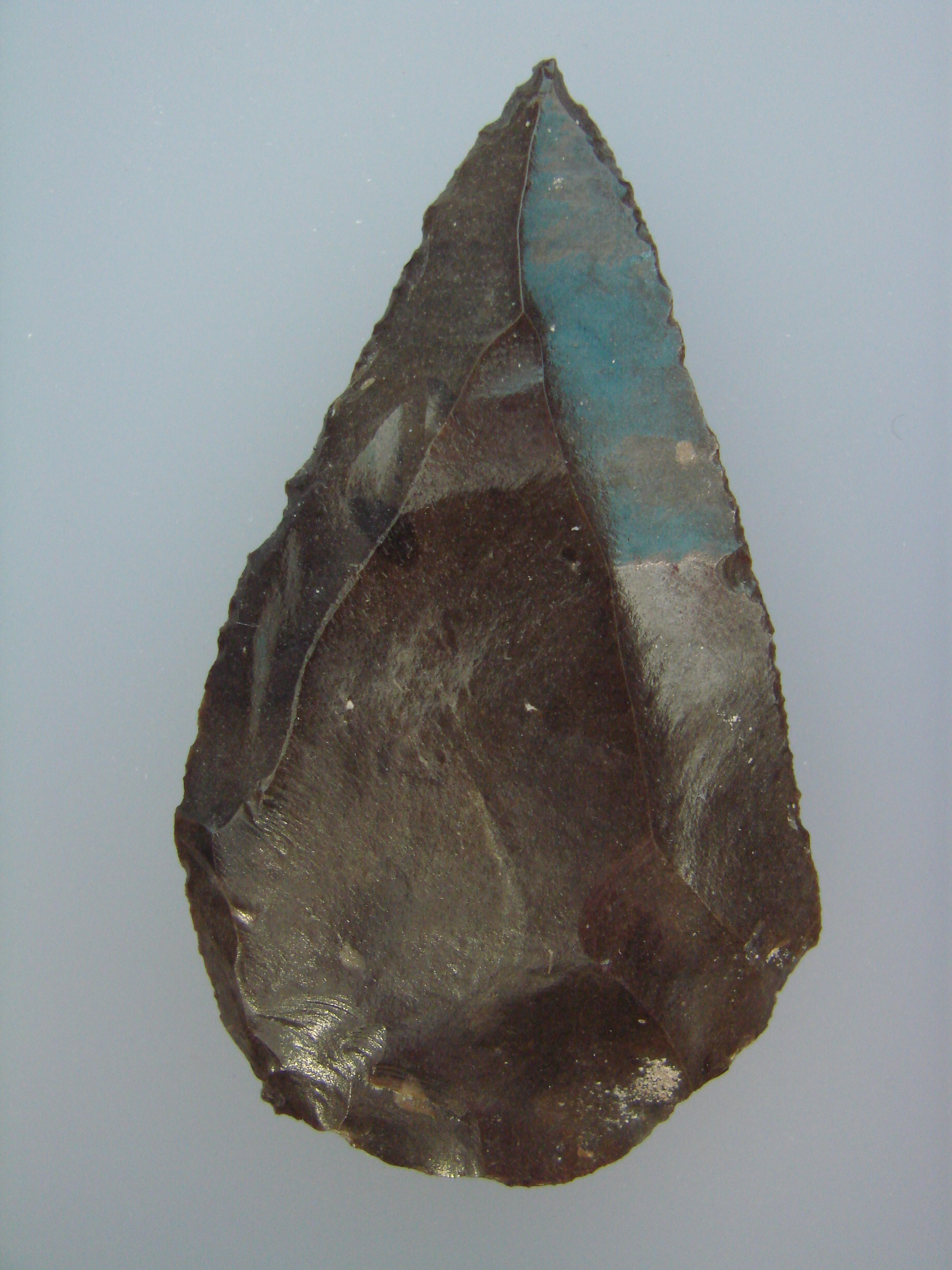 Muséum d'Anthropologie, campus universitaire d'Irchel, Université de Zurich (Suisse) : outil de culture moustérienne, technique Levallois. Trouvé en Syrie.